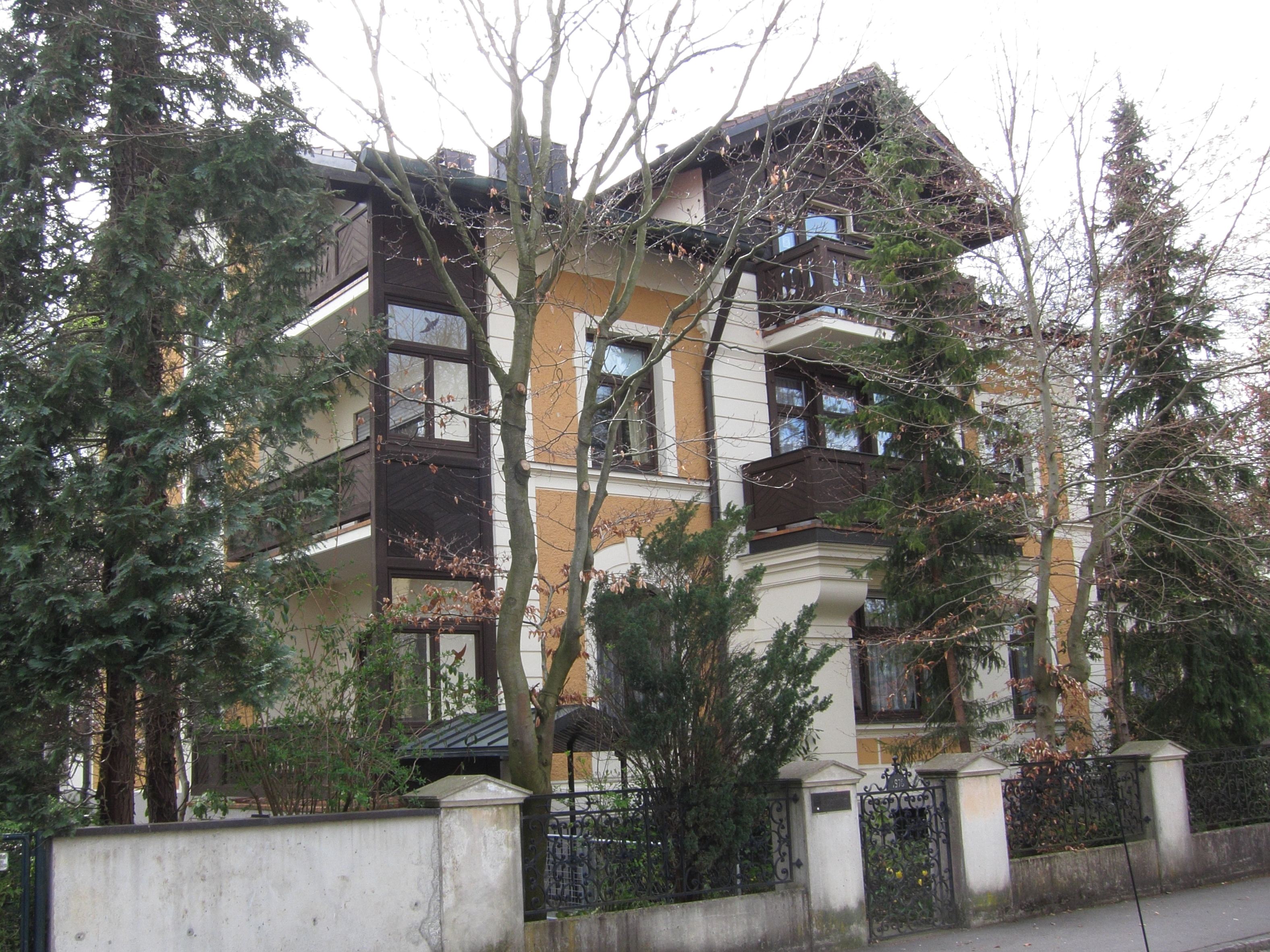 Wehnerstraße 7; Villa, mit Fachwerk, Holzbalkon, bez. 1897, von Louis Ende.